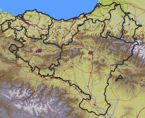 Euskal Herriko mapa fisikoa